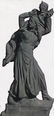 Súsošie s názvom Útek z horiacej obce umiestnené na pamätníku v obci Zlatá Baňa, okres Prešov. Autor F.Gibala. This medium shows the protected monument with the number 707-1495/0 (other) in the Slovak Republic.